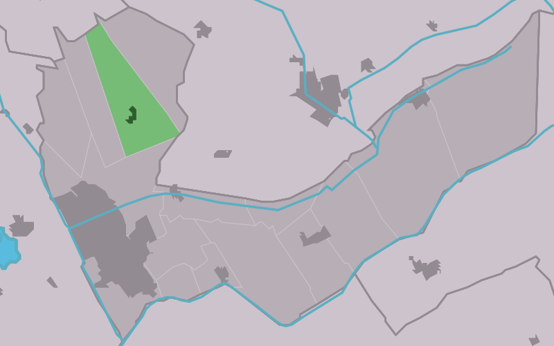 Kaartsje fan himrik fan Tsjalbert